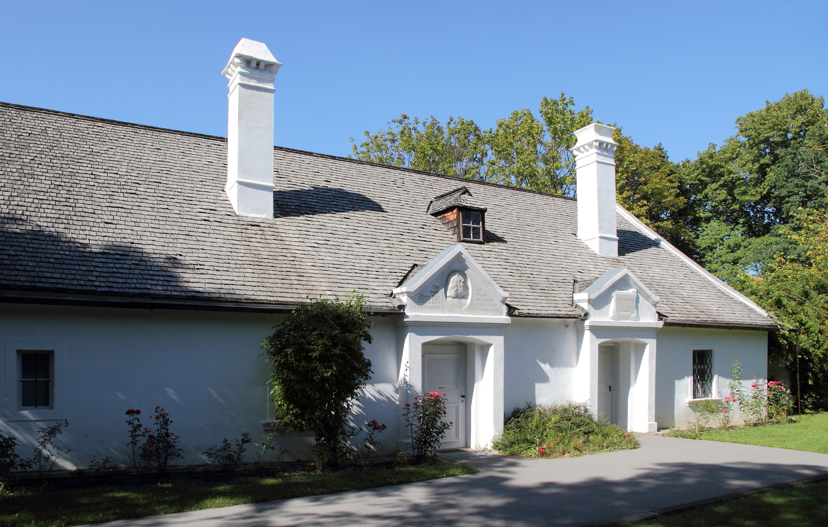 Geburtshaus von Franz Liszt in der burgenländischen Gemeinde Raiding. 1954 plaques for cultural property protected by the Hague Convention in Austria